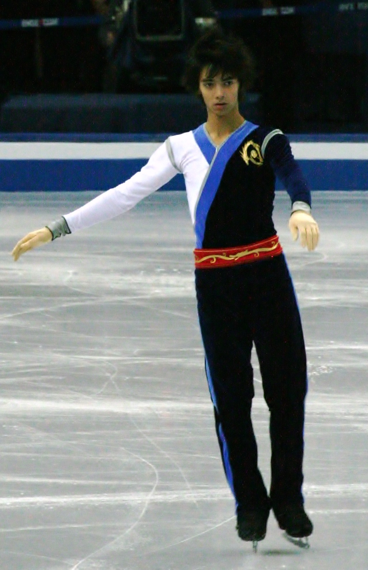 Руджи Хино (Япония) на финале Гран-при среди юниоров 2012-2013. Короткая программа.